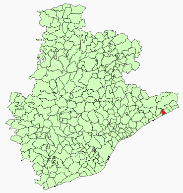 Calella